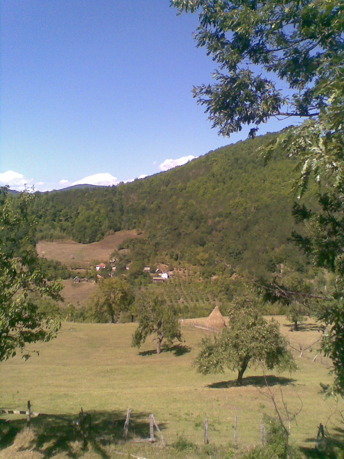 Село Тупци, Република Српска. Аутор OgiPFC